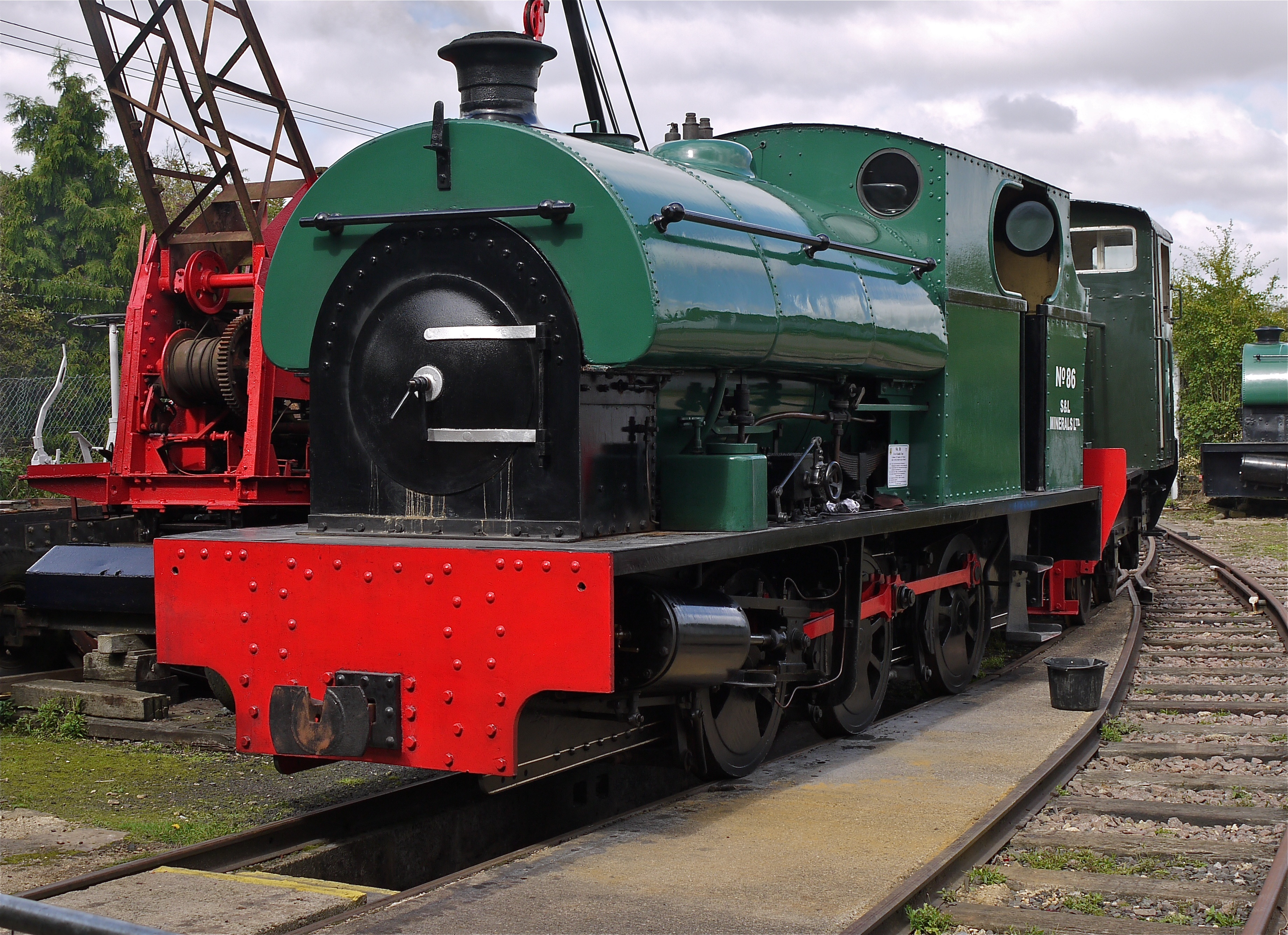 Panasonic G1 14-45 Lens